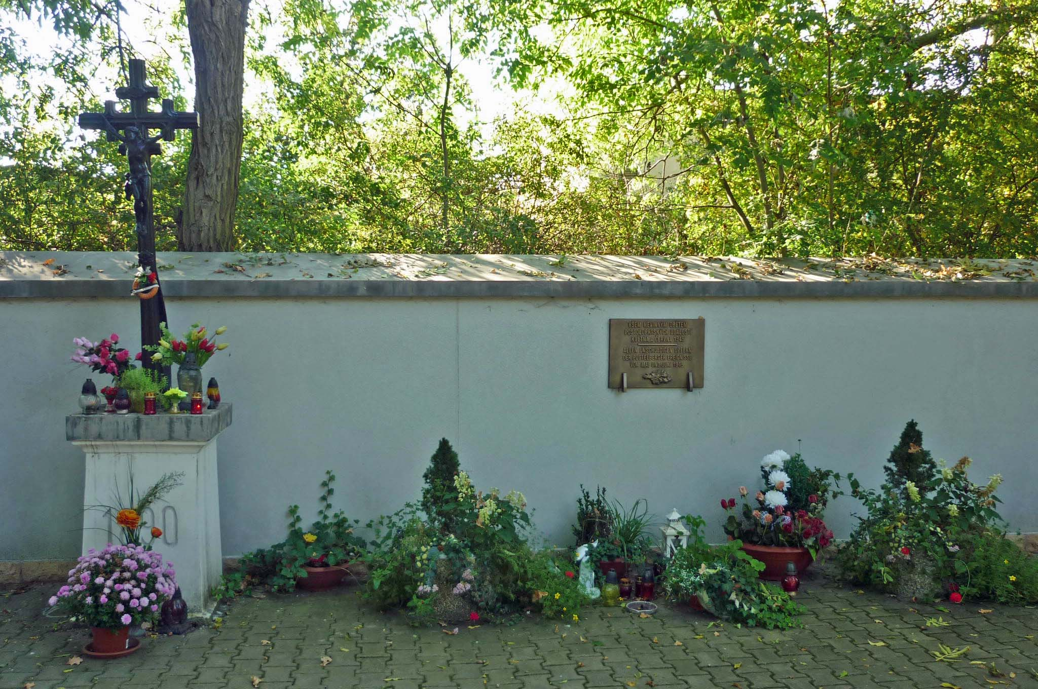 Gedenkstätte auf dem Friedhof in Postelberg/Postoloprty